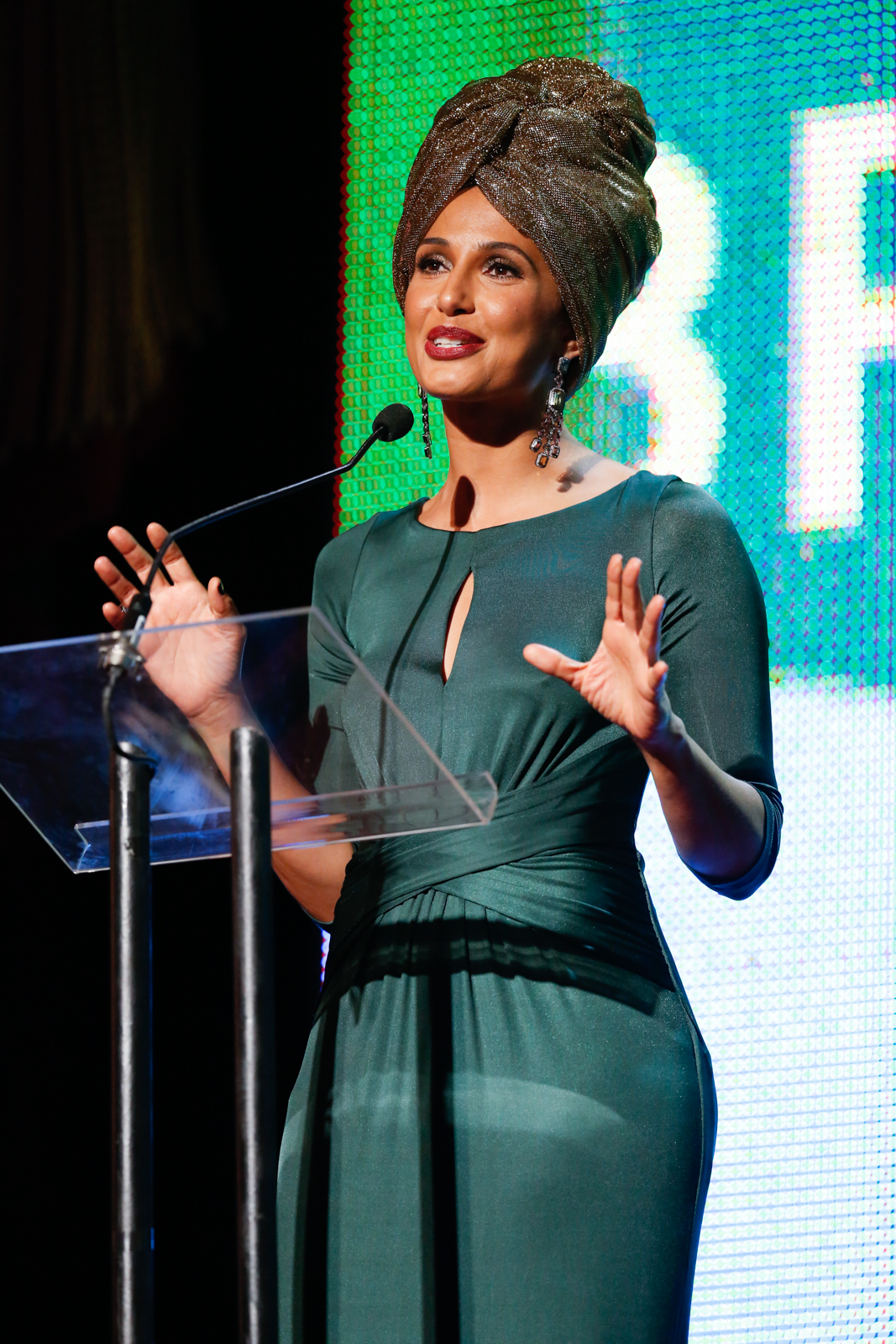 Camila Pitanga durante o 25o Premio da Musica Brasileira no Theatro Municipal. Foto: Roberto Filho (14/05/14)